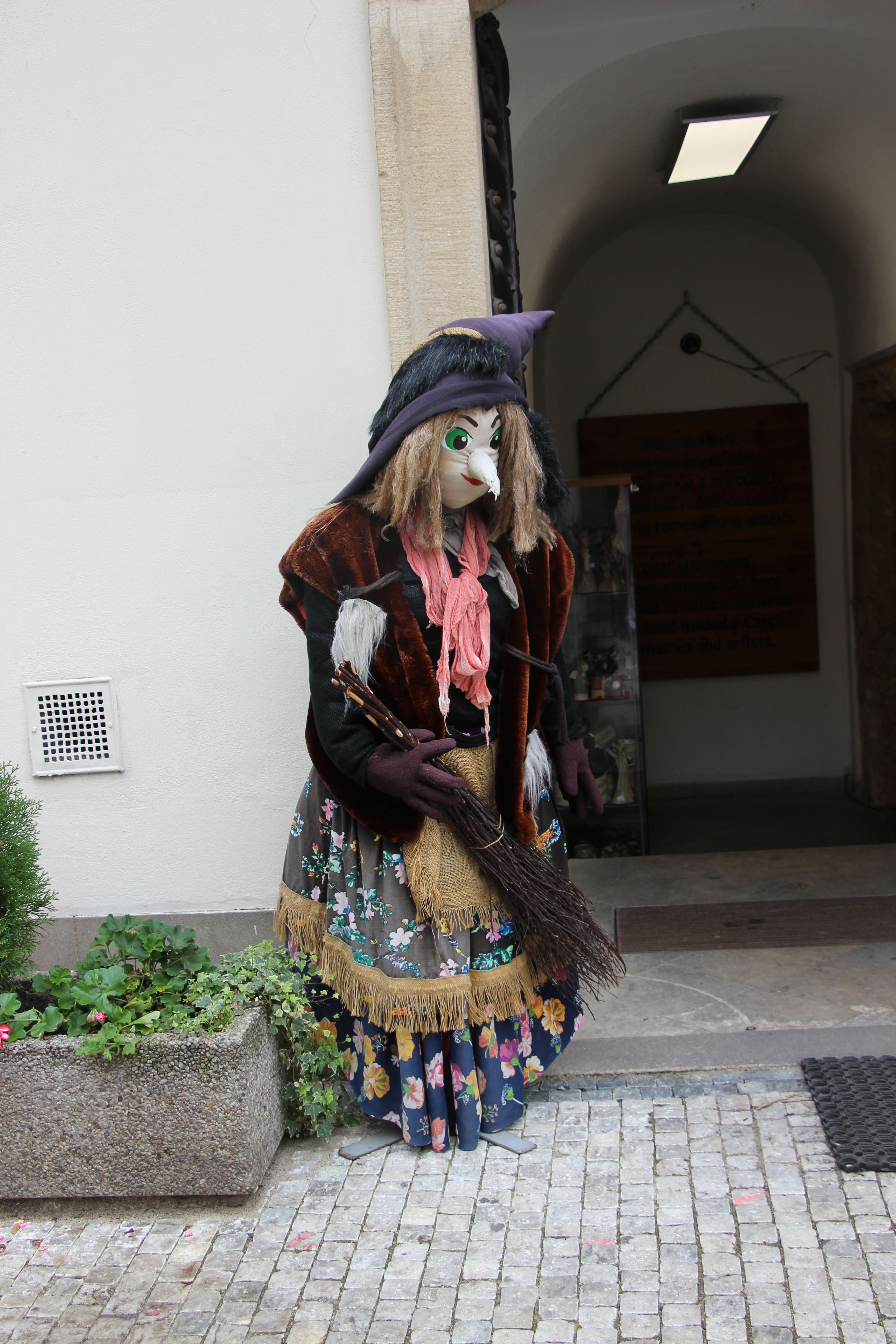 פסל בצורת מכשפה ברחוב הראשי של פראג A witch-shaped statue on the main street of Prague